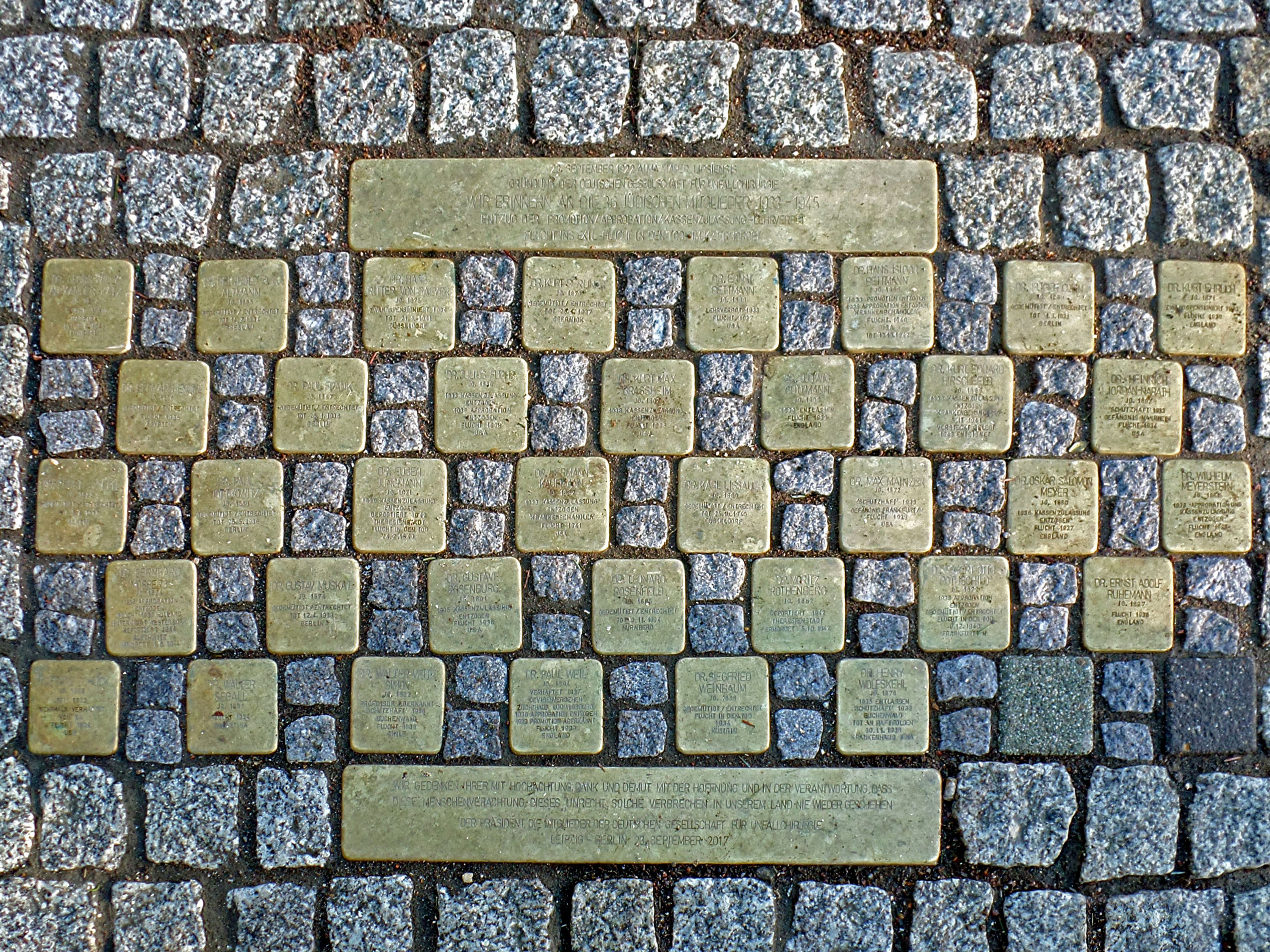 Stolpersteine vor dem Leipziger Klinikum, Liebigstraße 20